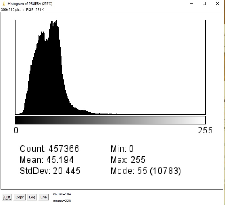 Histograma original